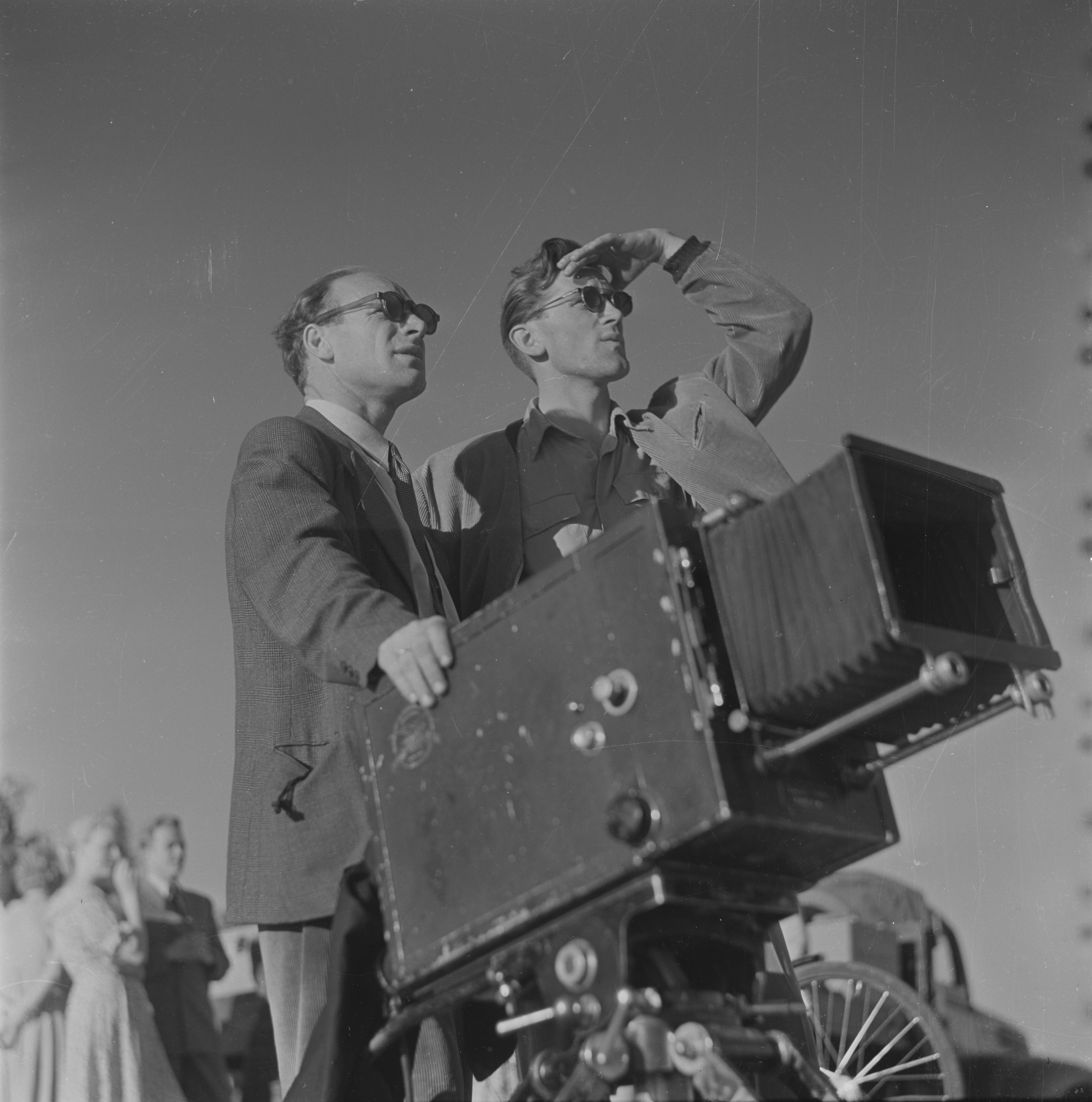 Bildet er hentet fra Arkivverket. Foto fra innspillingen av den norske filmen "Andrine og Kjell". Arkivinstitusjon : Riksarkivet Arkivnavn : Billedbladet NÅ Sted : Norge, Ukjent, Ukjent, Avbildet